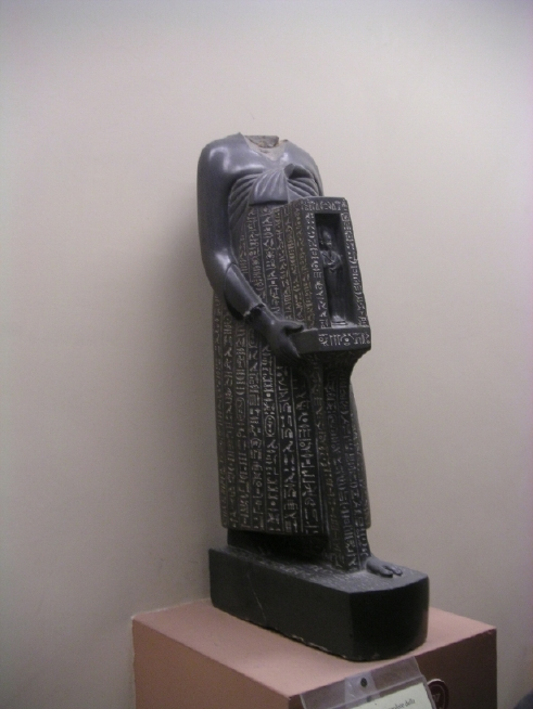 Statue du dignitaire saïte Oudjahorresné - XXVIe et XXVIIe dynasties égyptiennes - Museo Gregoriano du Vatican - Rome